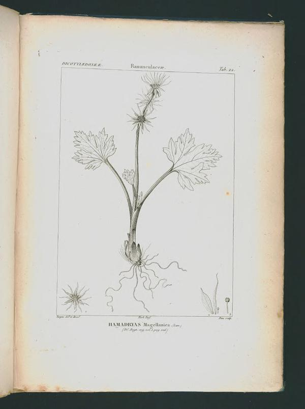 Icones selectae plantarum quas in systemate universali :ex herbariis parisiensibus, praesertim ex Lessertiano /descripsit Aug. Pyr. de Candolle, ex archetypis speciminibus a P.J.F. Turpin delineatae et editae a Benj. De Lessert ...